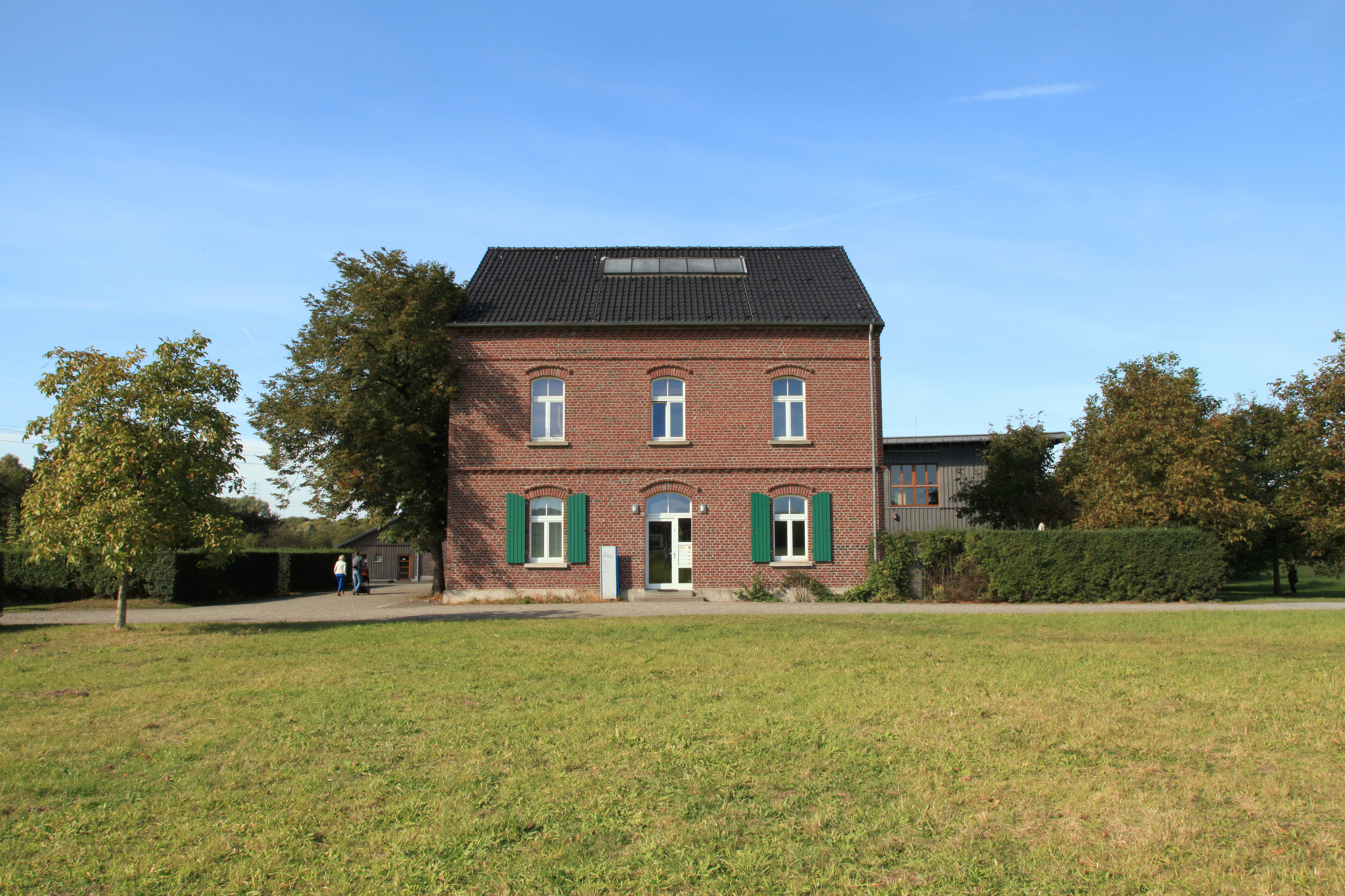 Haus Ripshorst, Ripshorster Straße 306 in Oberhausen